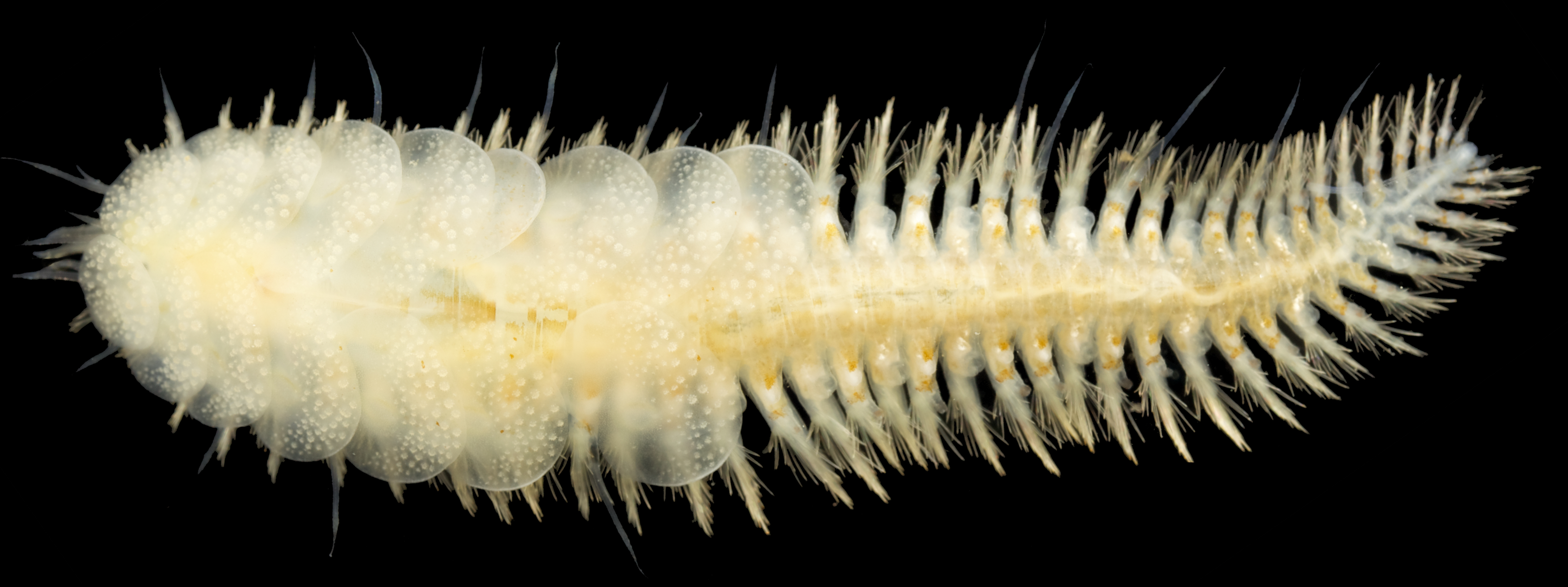 Leucia nivea